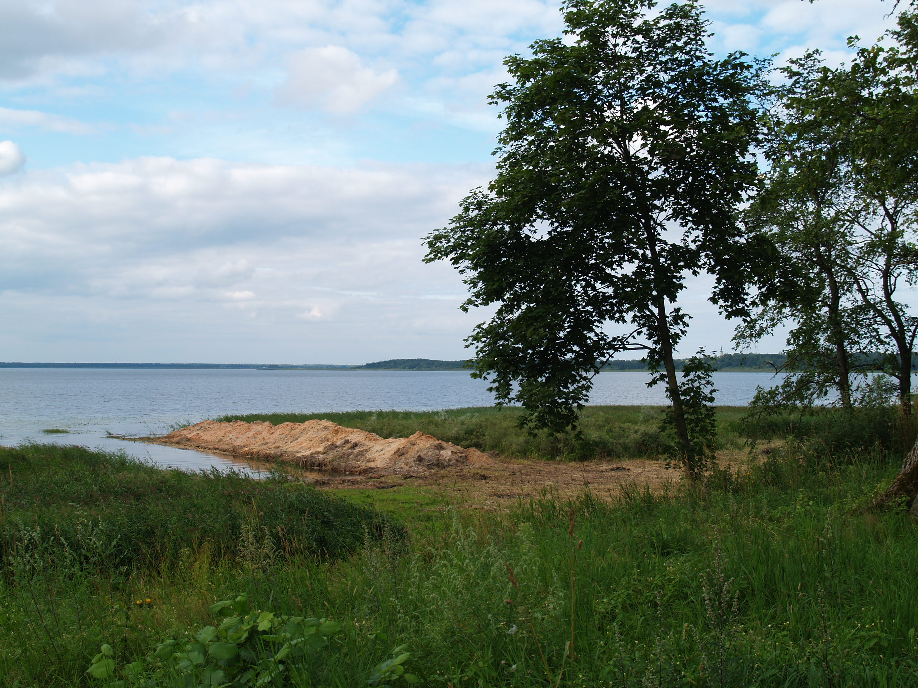 Asti järv ehk Burtnieki järv.